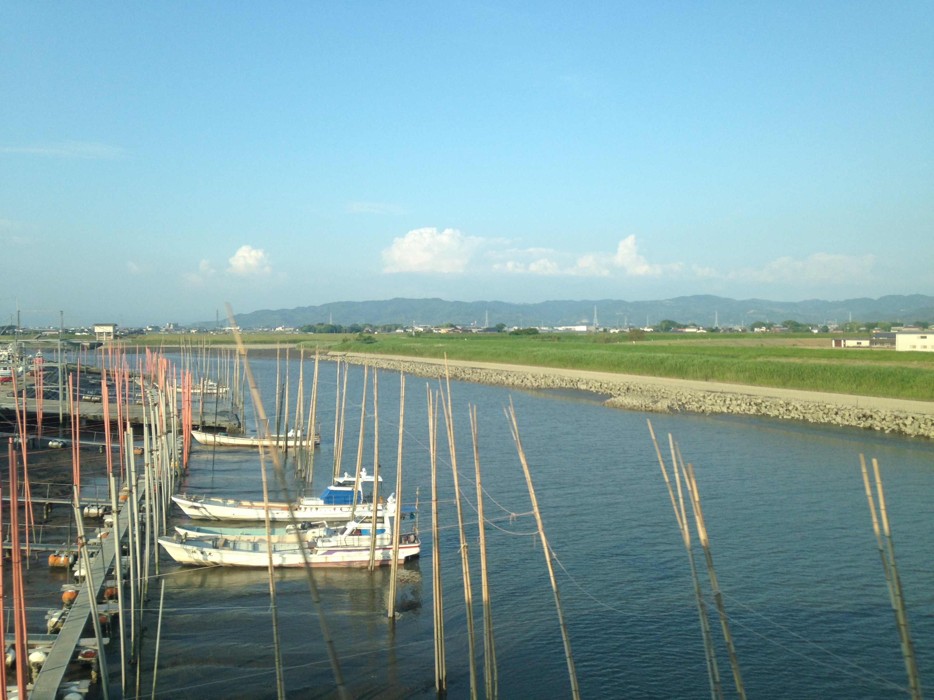 西鉄天神大牟田線(江の浦-西鉄中島間)の列車内より望む矢部川(上流側)